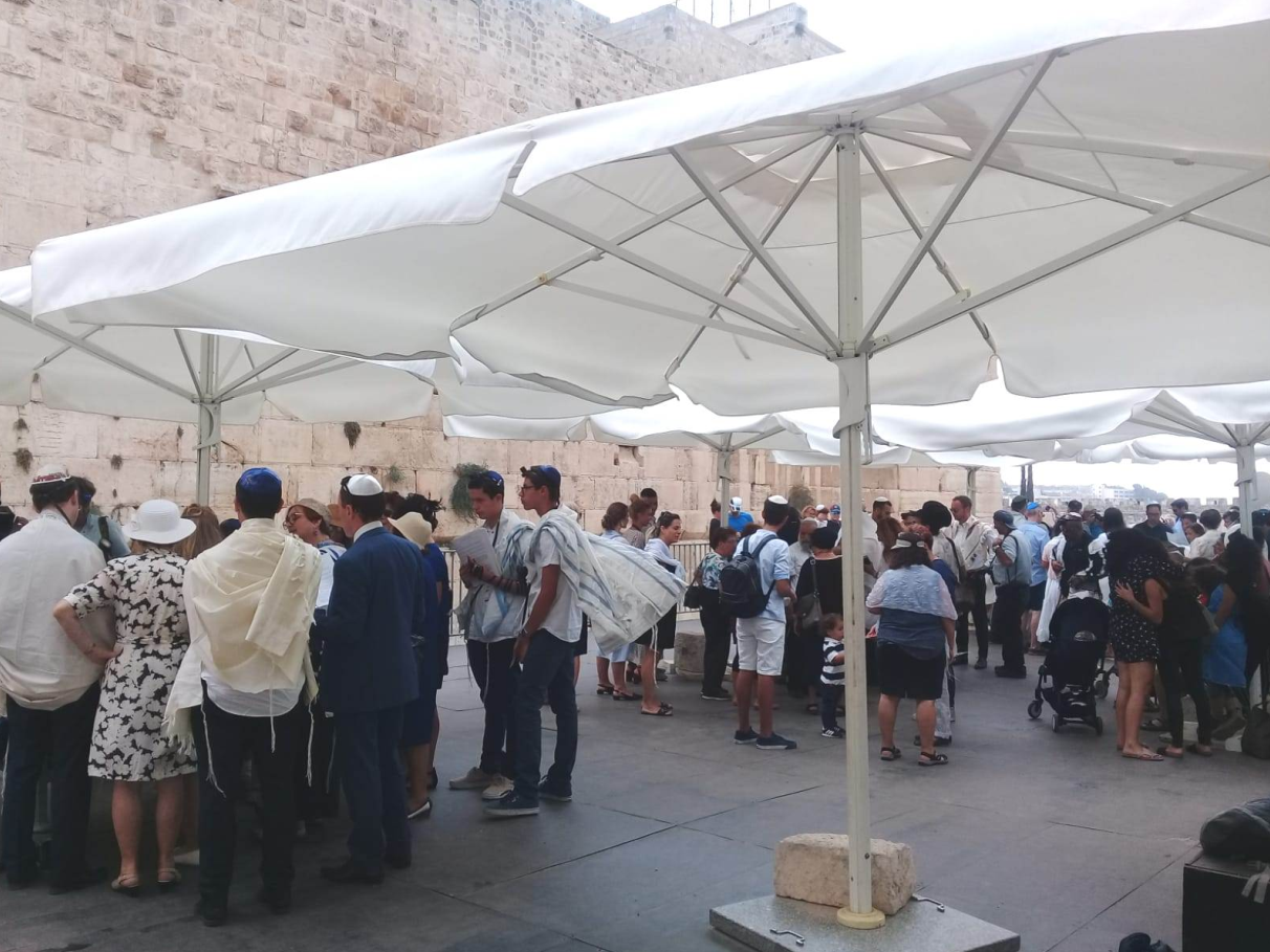 תפילות בעזרת ישראל, רחבת התפילה השוויונית בכותל